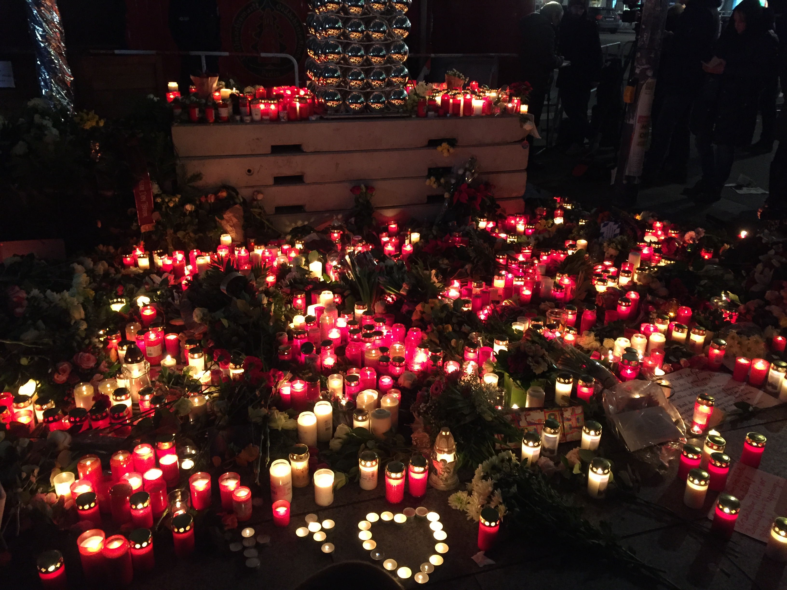 2016 Berlin Christmas market truck attack - hommage